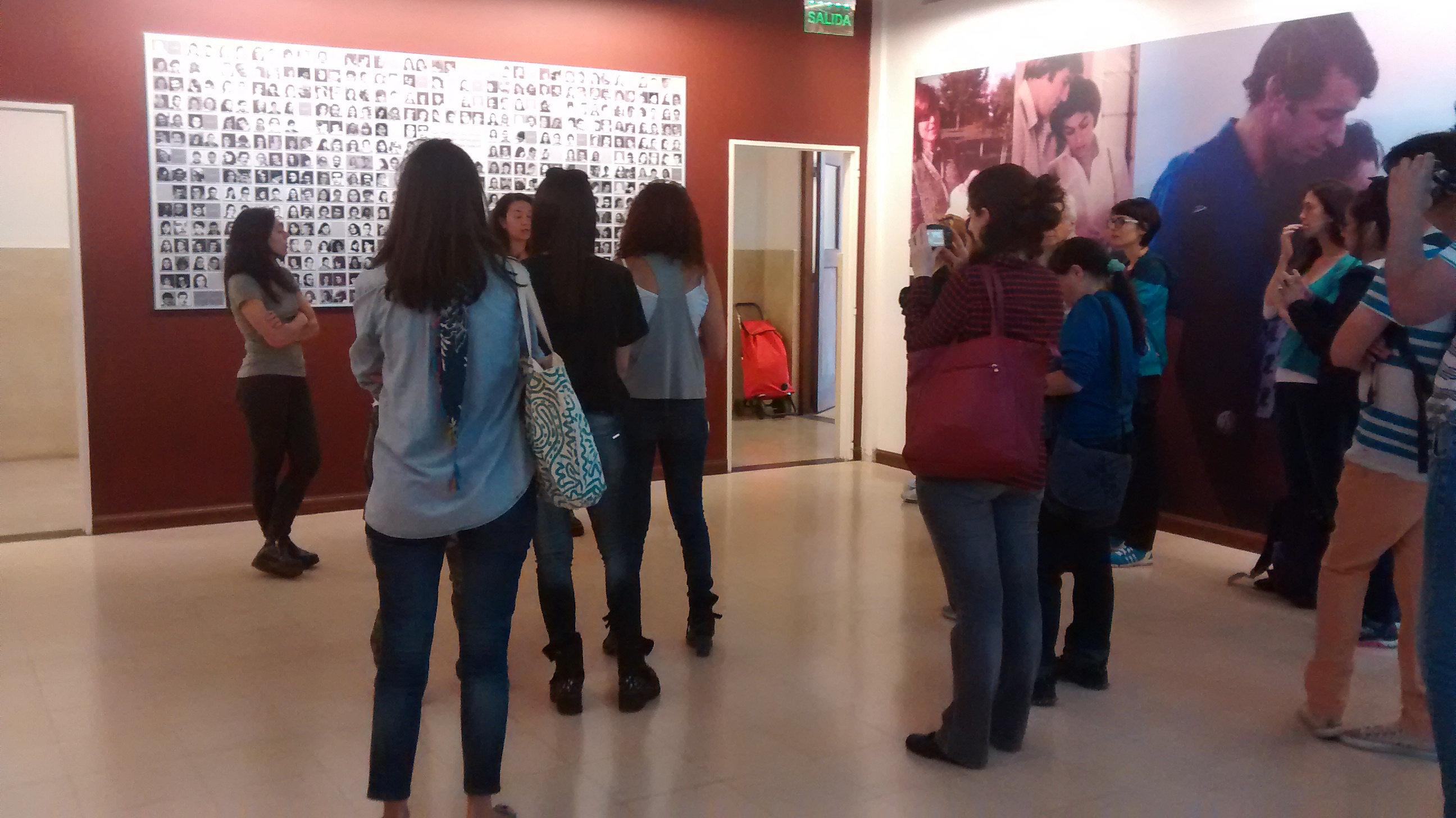 Editatón Abuelas de Plaza de Mayo